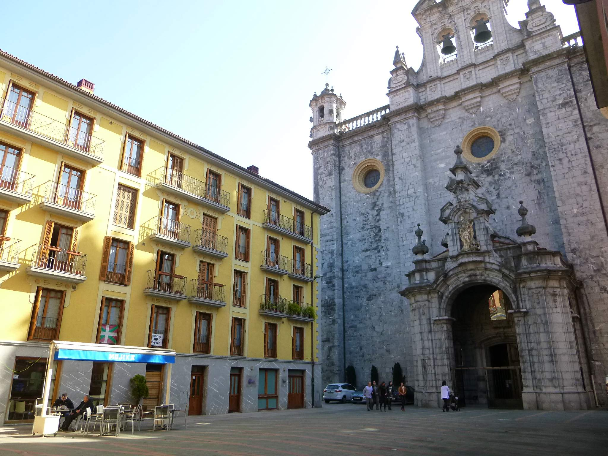 Andre Maria Plaza (Tolosa)